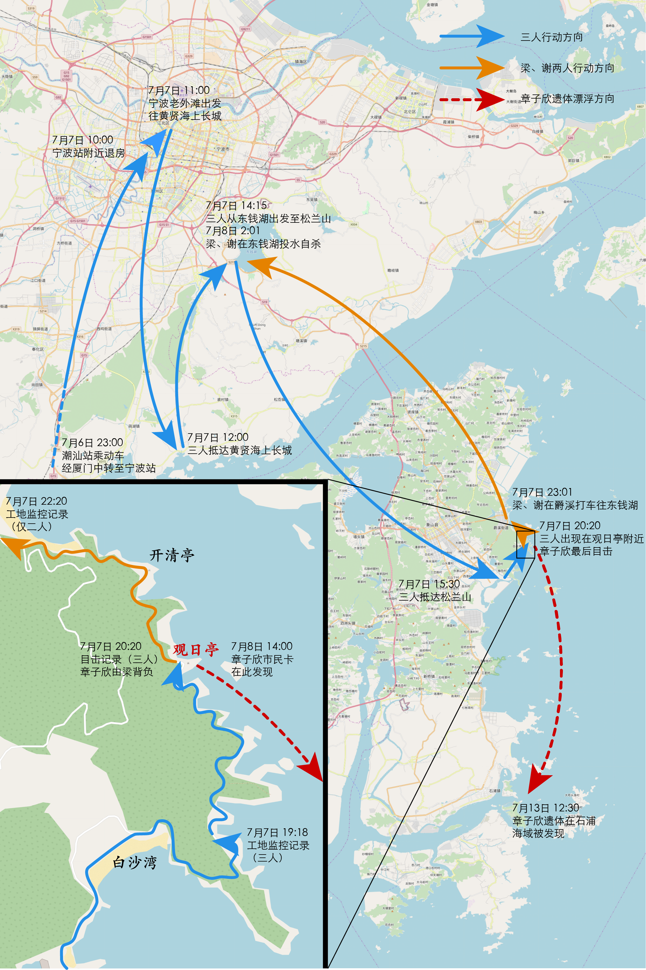 9岁淳安女童章子欣及梁、谢在宁波市境内出现的大致轨迹 This map may be incomplete, and may contain errors. Don't rely solely on it for navigation.